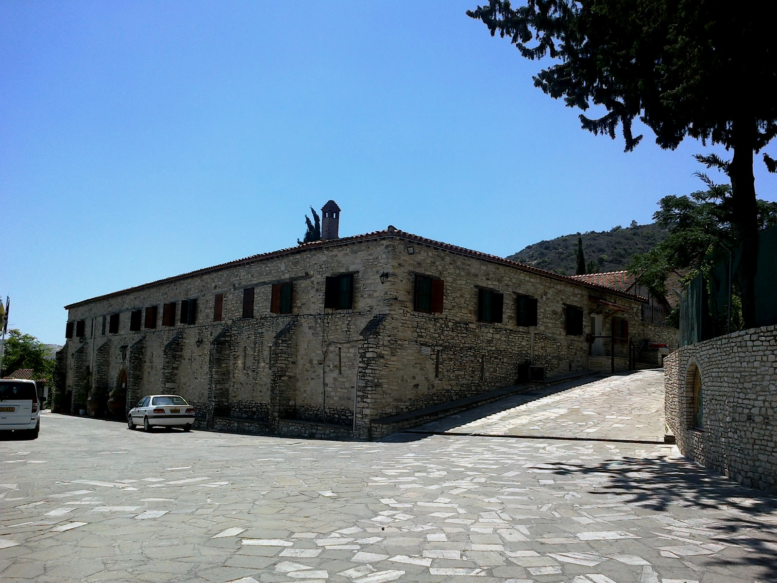 Chypre Agios Minas Monastere 23062014